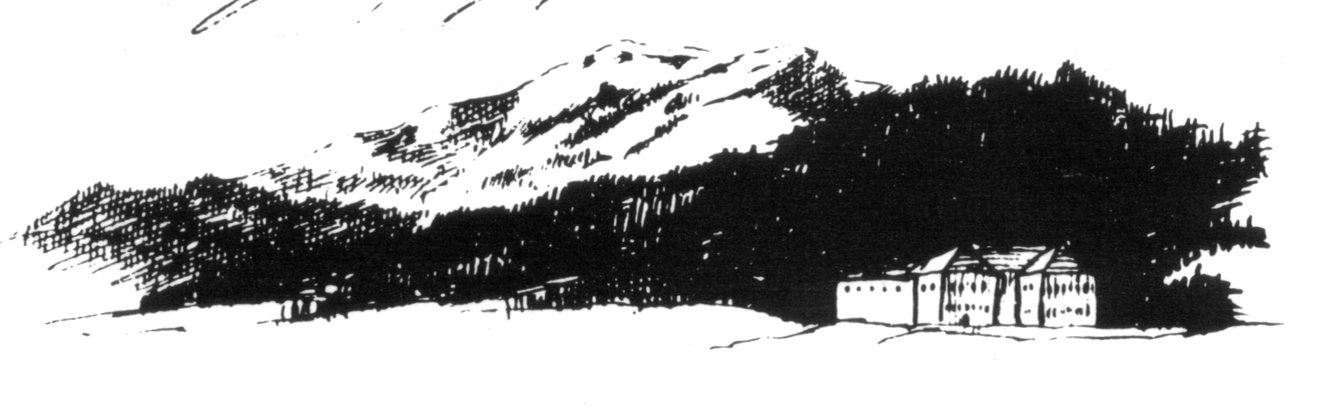 Seite aus Tagebuch von Felix Mendelssohn Bartholdy und seiner Ehefrau Cécile Jearenaud. Sie kamen 1837 auf ihrer Hochzeitsreise nach Freiburg. Unten eine Skizze der Kartause